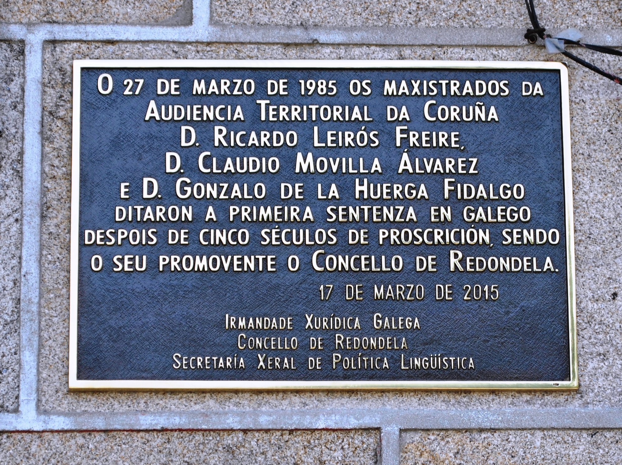 Véxase o título e as categorías.